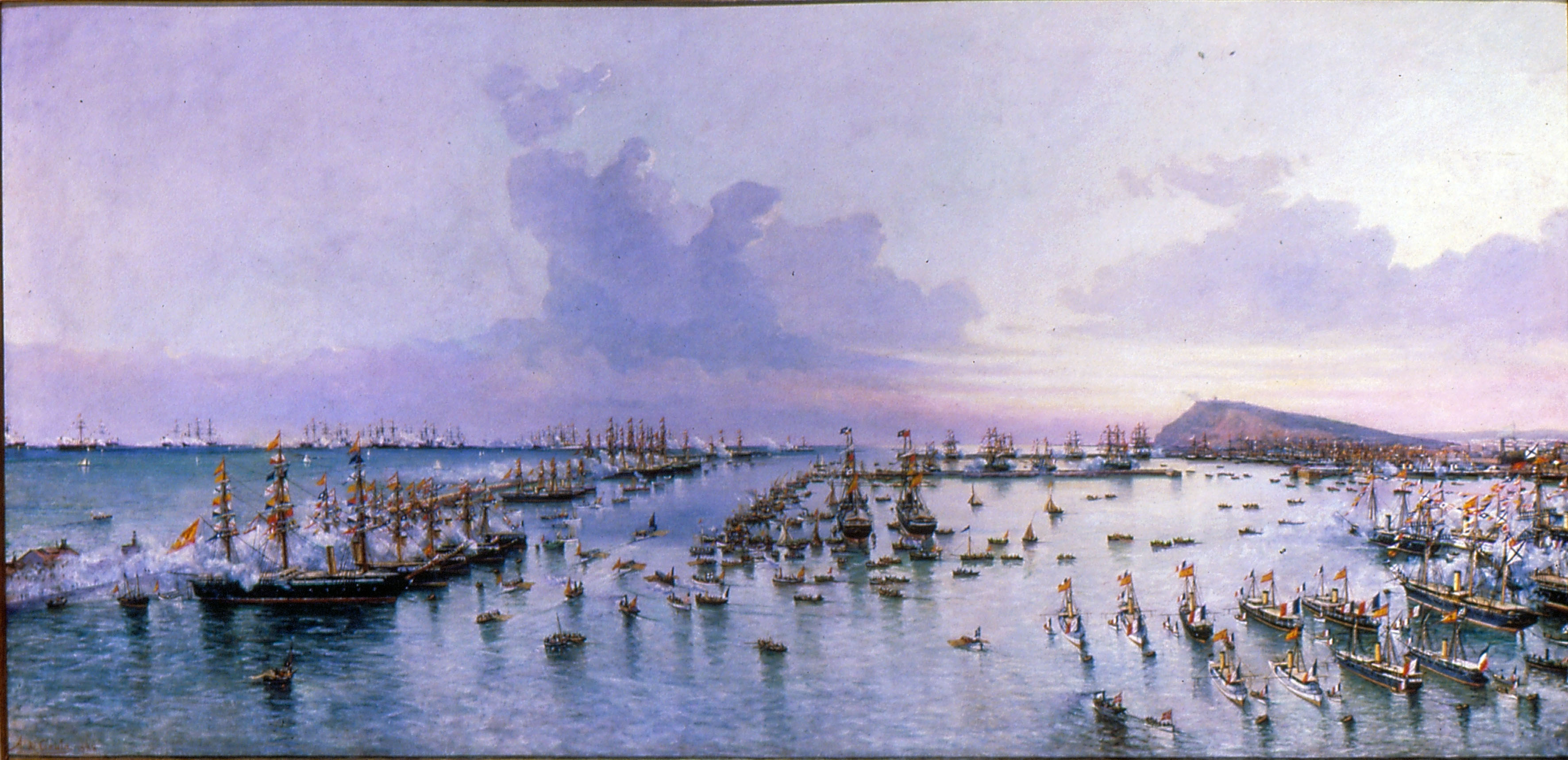 El lienzo representa la revista pasada por la reina Regente María Cristina de Habsburgo-Lorena a las escuadras nacionales y extranjeras, reunidas en el puerto de Barcelona con motivo de la Exposición Universal de 1888, celebrada en la ciudad de Barcelona.